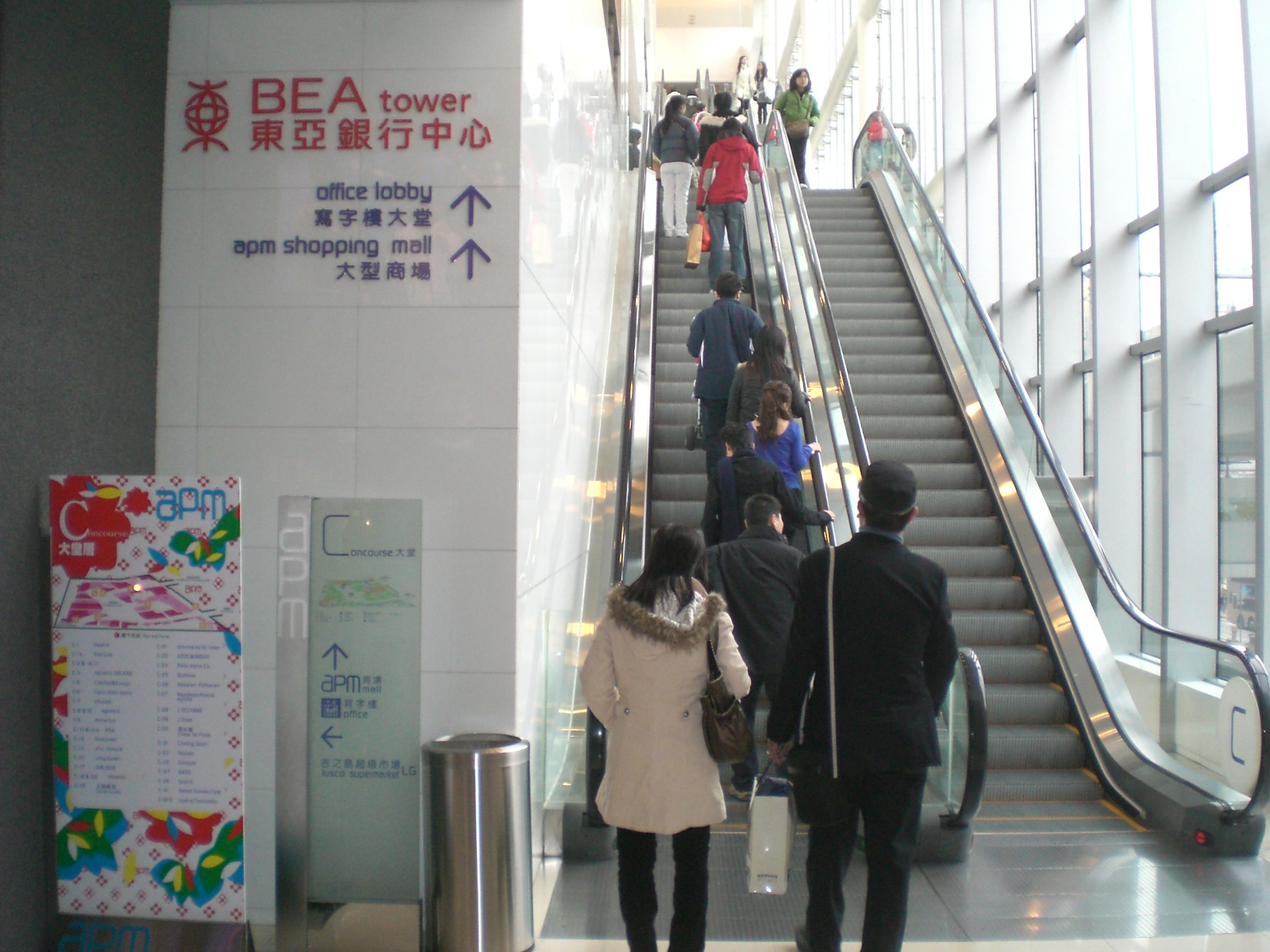 觀塘創紀之城5期東亞銀行中心